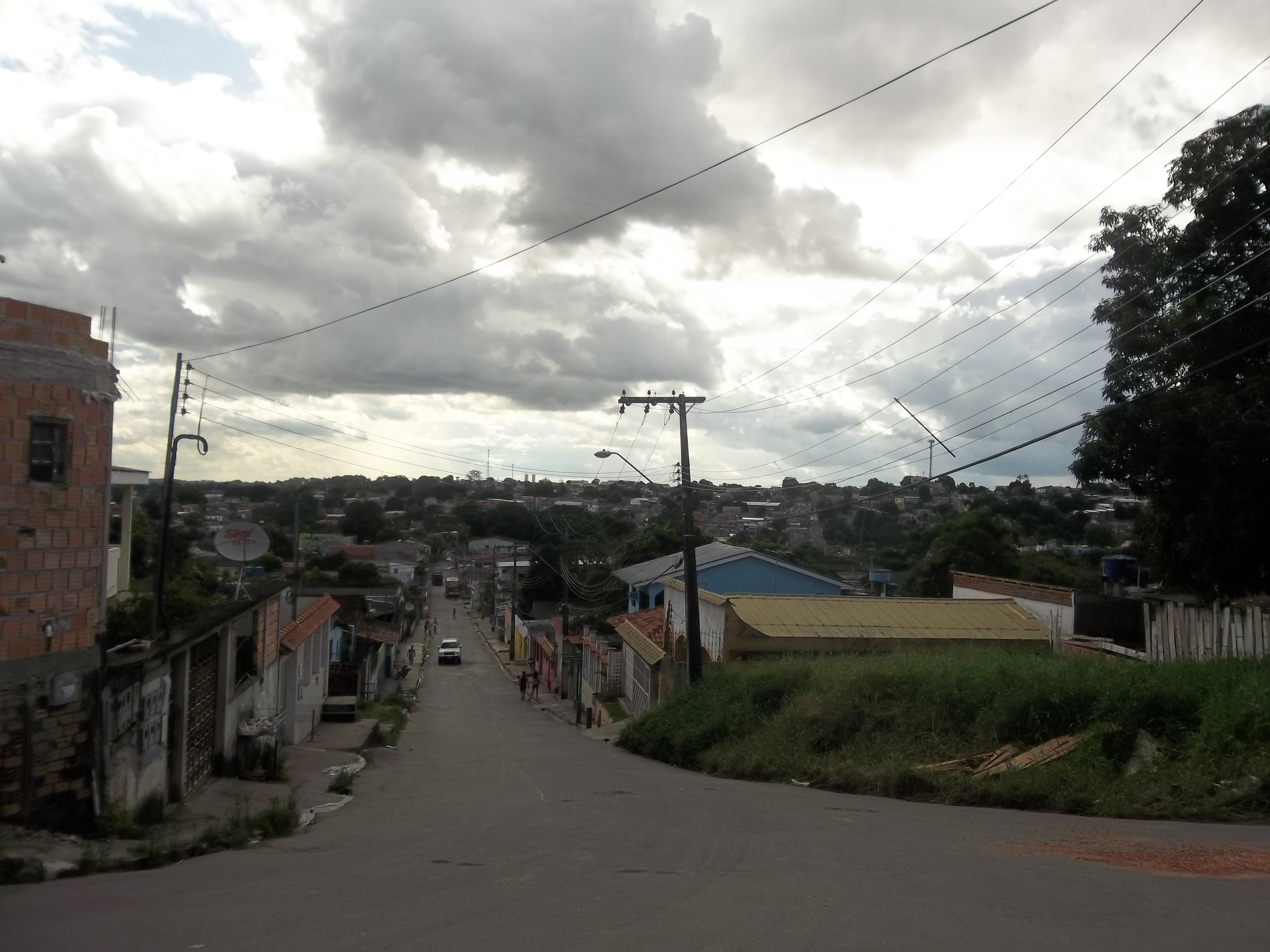 Vista parcial do bairro Novo Israel, em Manaus, Amazonas, Brasil.